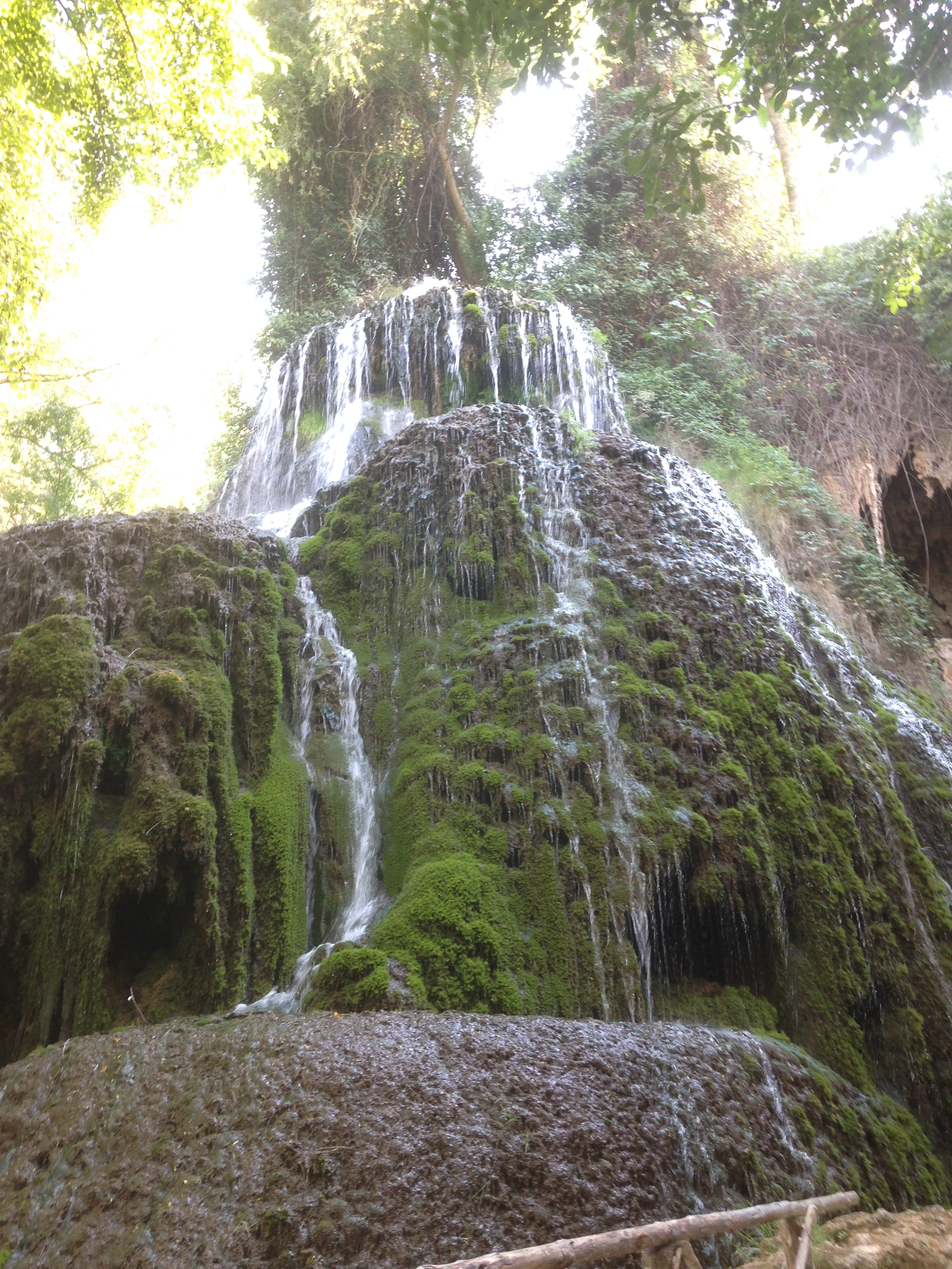 Monasterio de piedra, cascada en el parque natural. Nuévalos, Zaragoza Aragón (España)